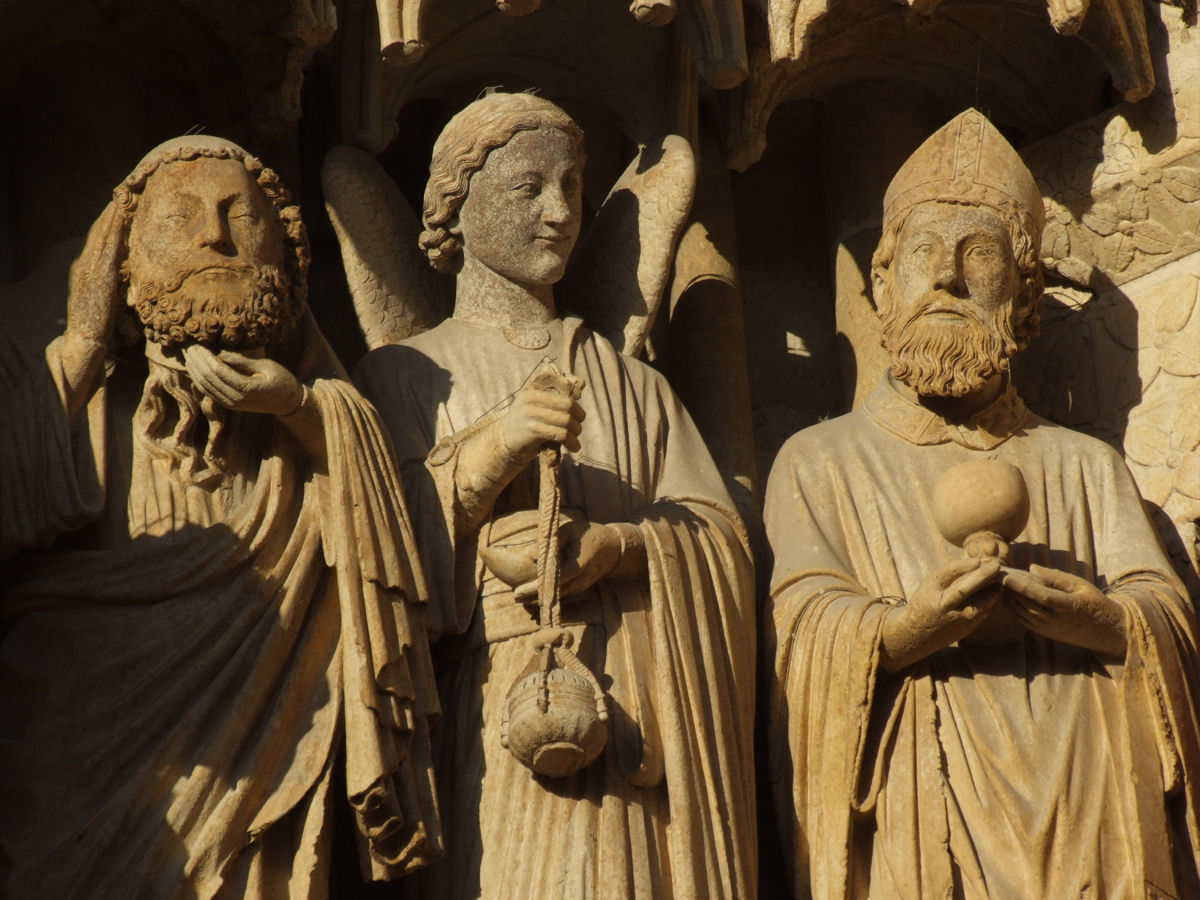 Amiens Cathedral (Cathédrale Notre-Dame d'Amiens), France